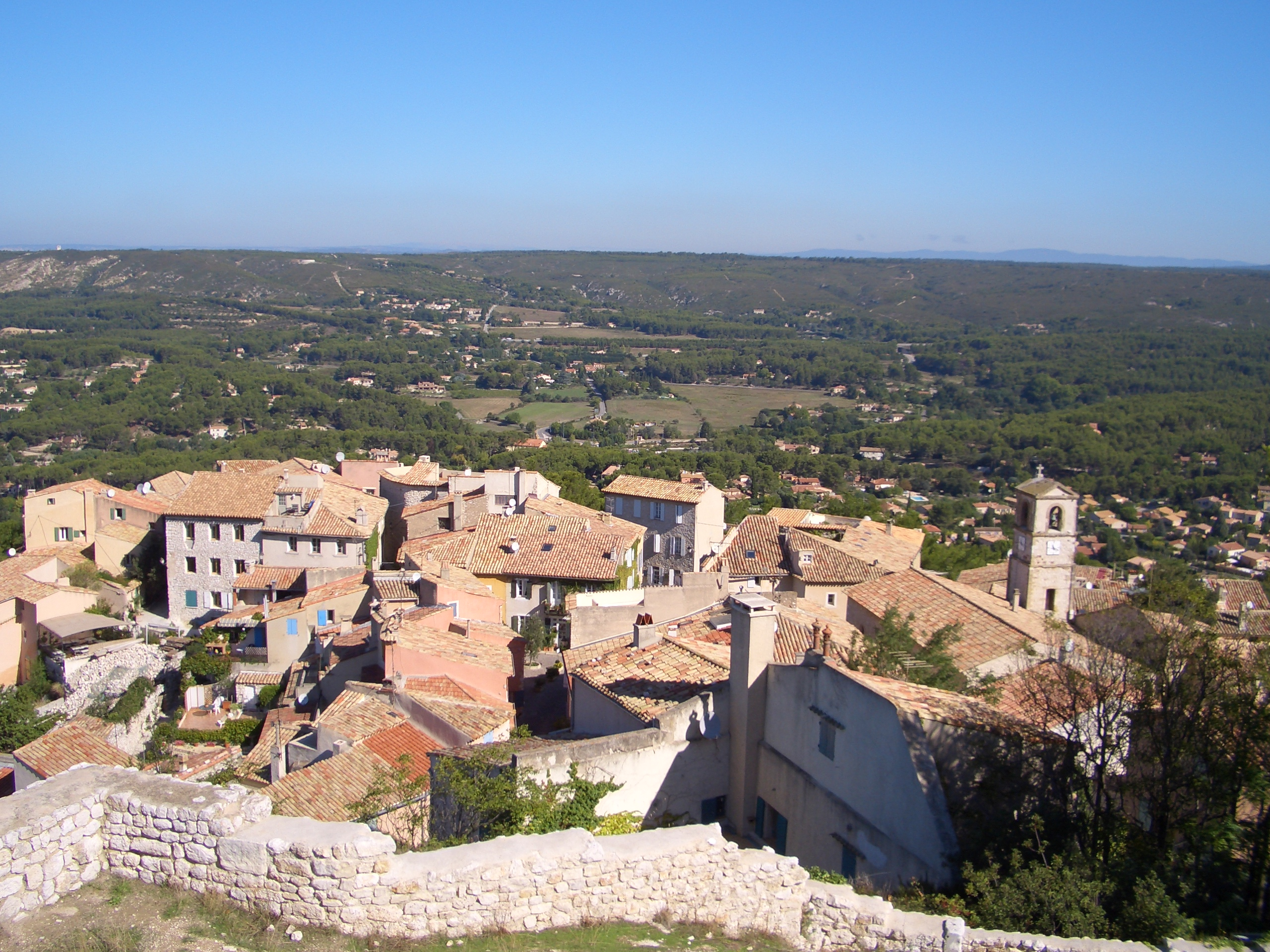 Vue générale du village de Ventabren (Bouches-du-Rhône)